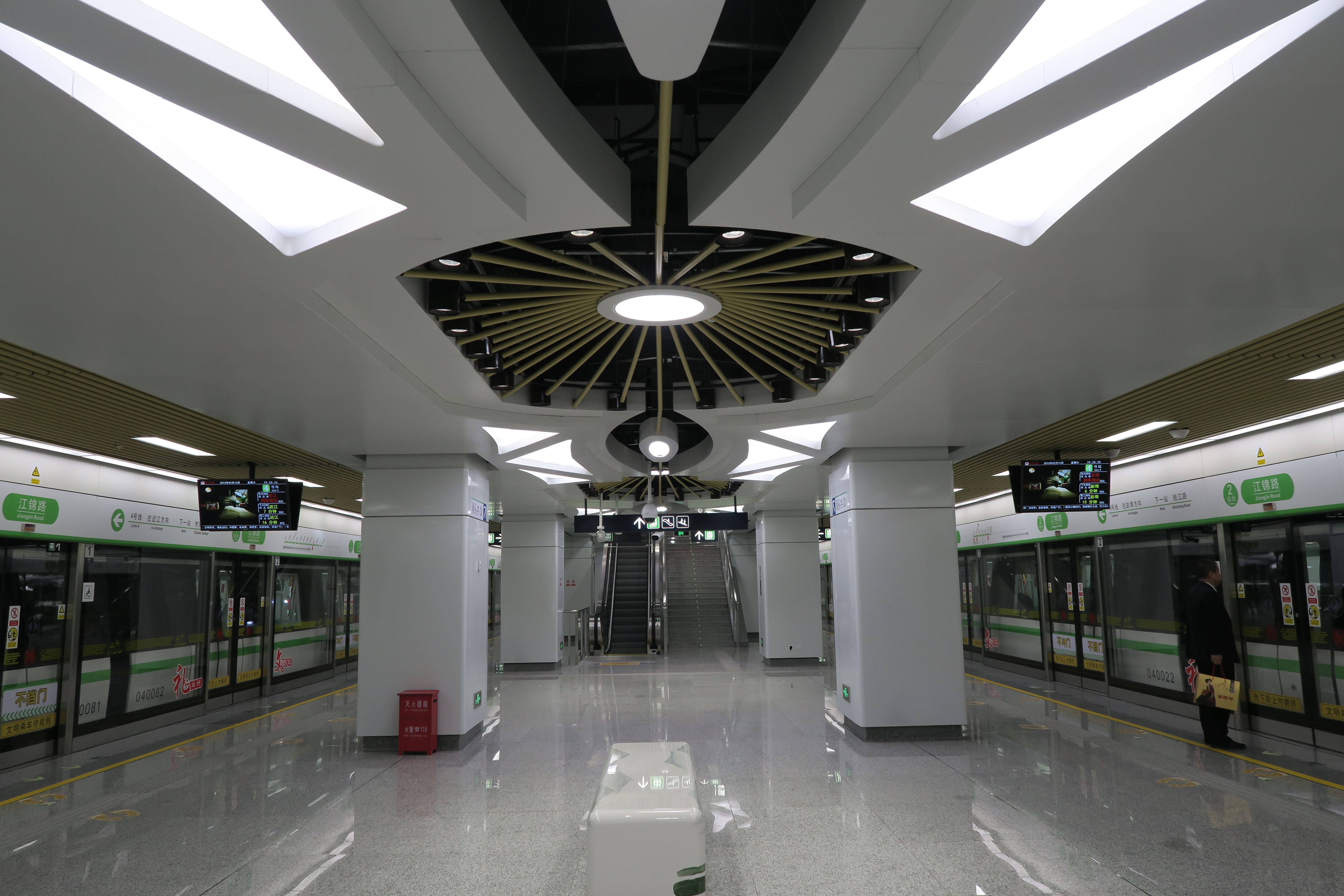 杭州地铁江锦路站